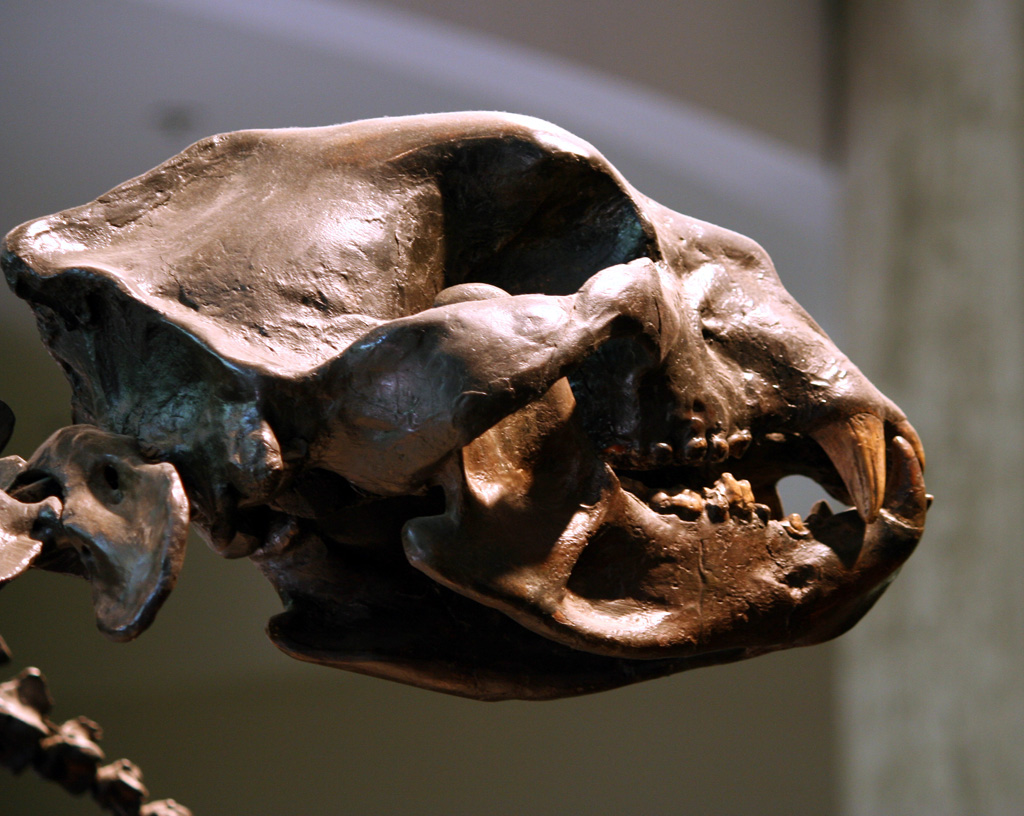 La Brea Tar Pits